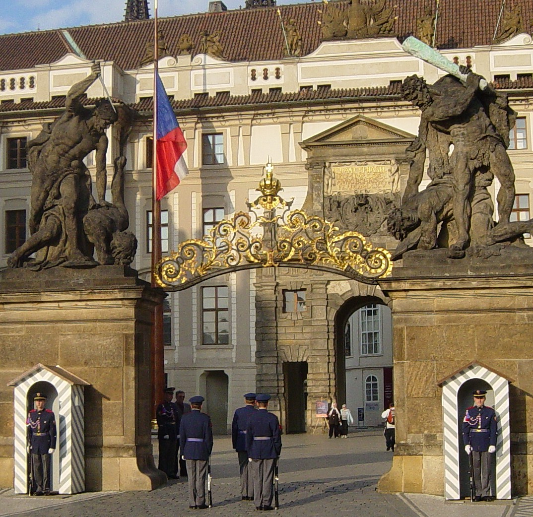 Praha, Hradní stráž